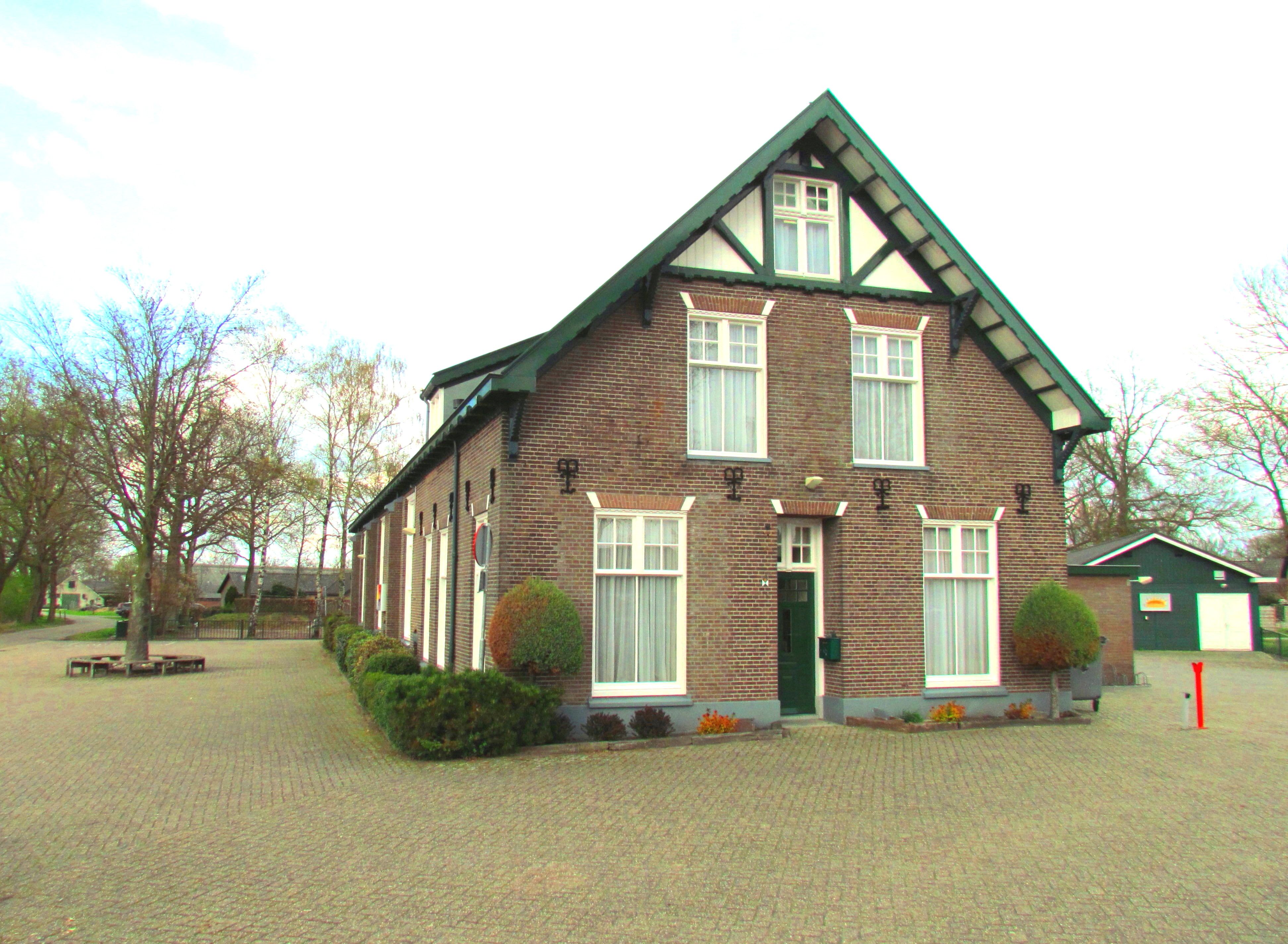 Dorpshuis van Oosterhuizen (gemeente Apeldoorn, NL)